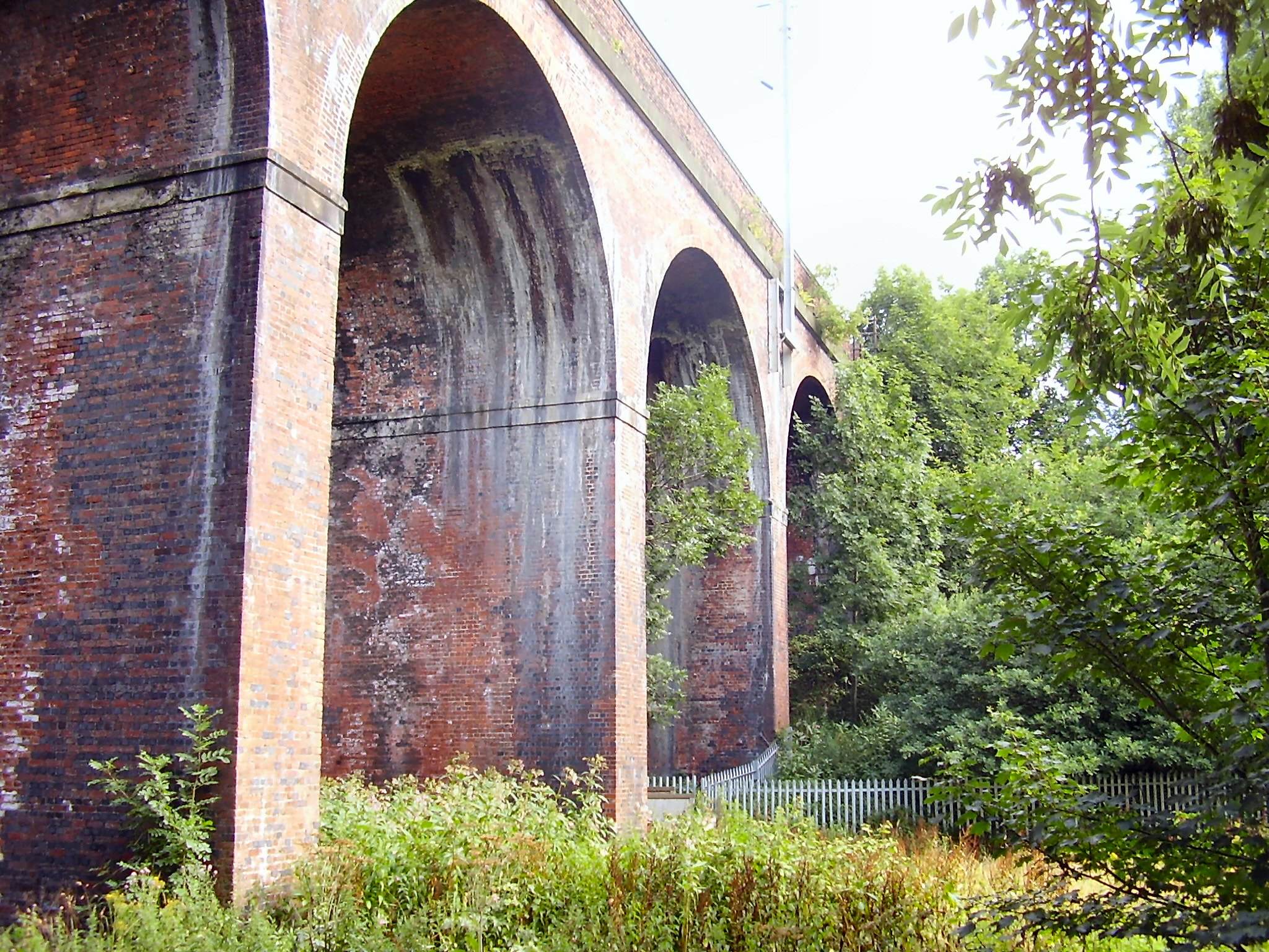 C Hoyle